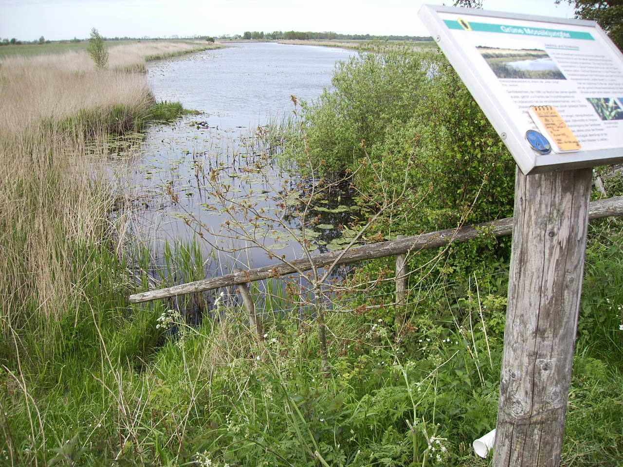 lte Sorge zwischen Meggterdorf und Erfde